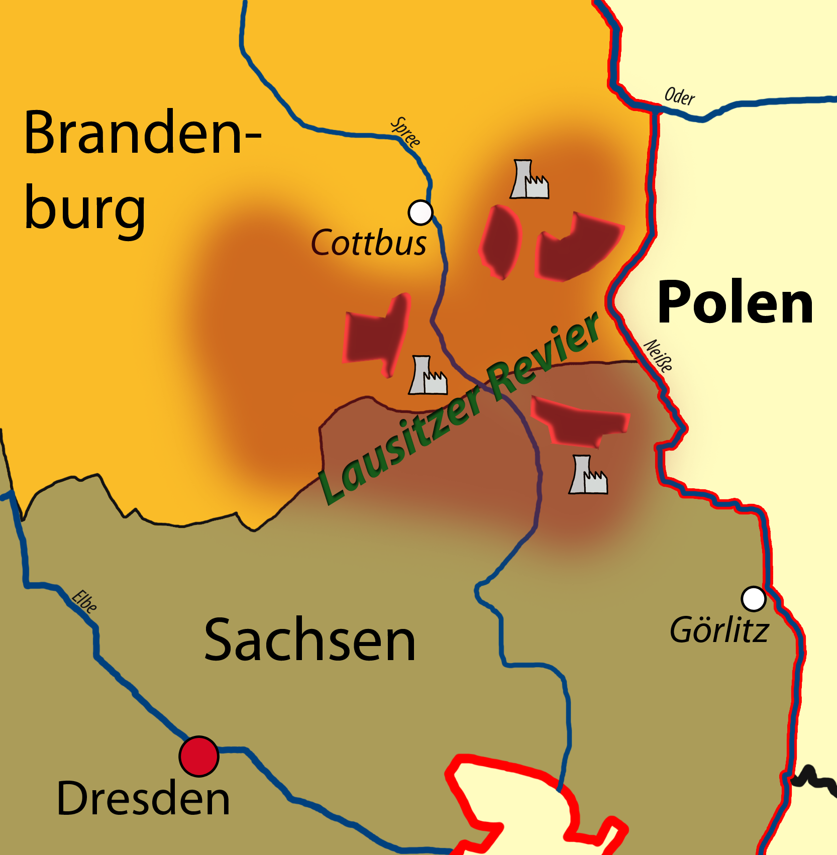 Karte der Lausitz mit Tagebauen und Kraftwerken Stand 2009